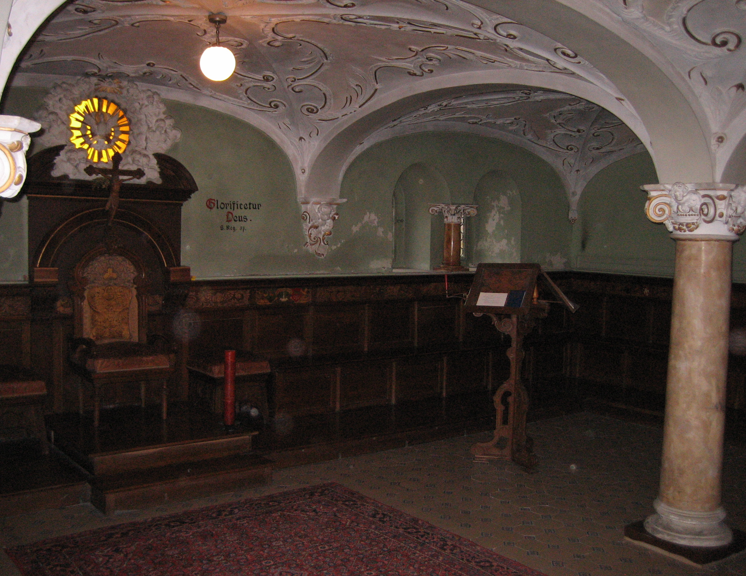 Kloster Wurmsbach: Kapitelsaal